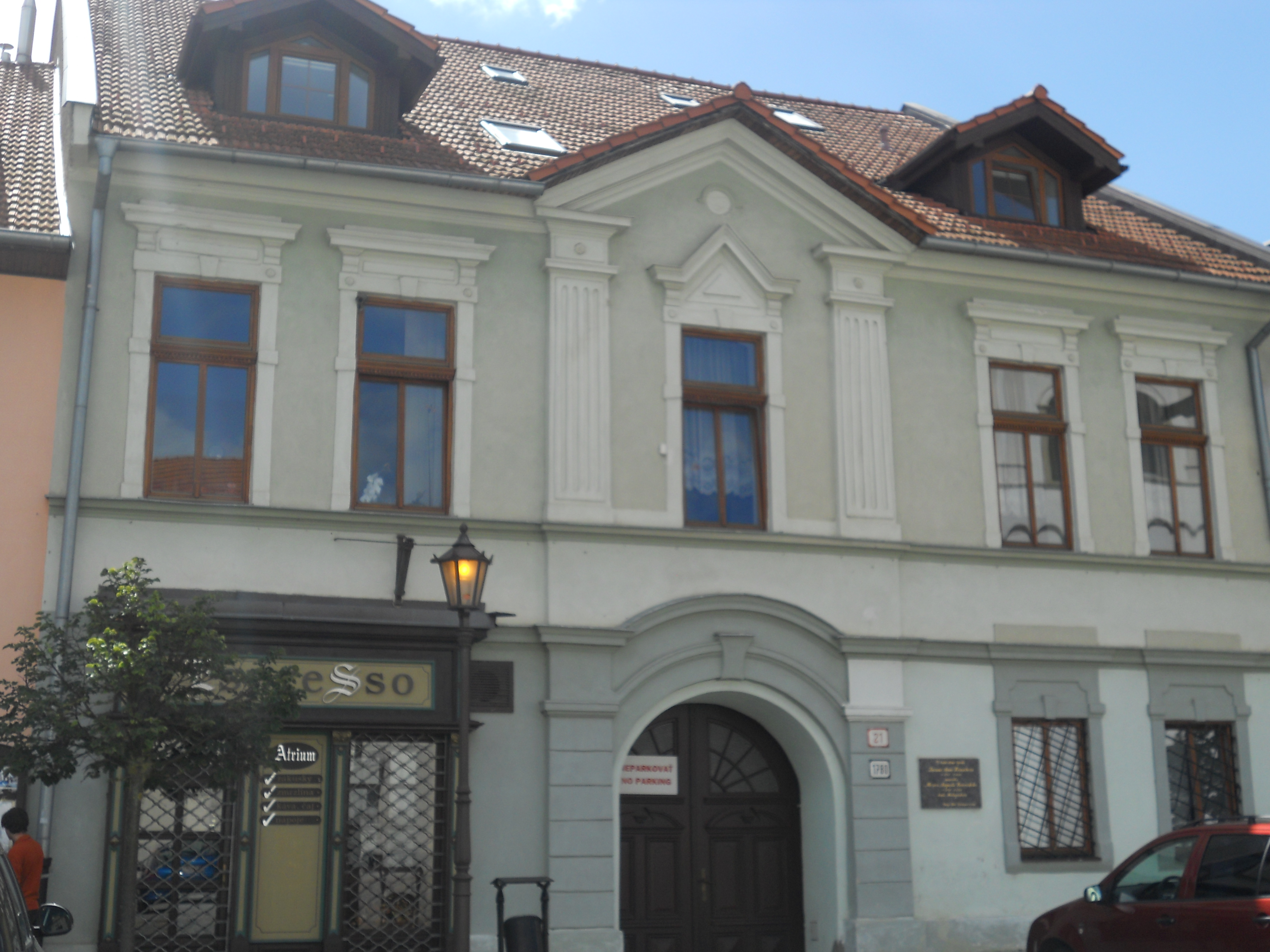 DOM MEŠTIANSKY+prejazdový,radový, Sobotské nám. 21